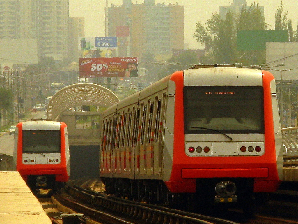 Interestación Vicente Valdés - Rojas Magallanes Línea 4, Metro de Santiago (Chile) Automotor AS-2002